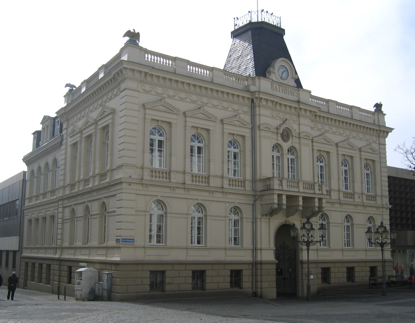 Description: "Altes Rathaus" in Iserlohn, erbaut 1874 als 4. Iserlohner Rathaus. Source: selbst fotografiert Date: 19. März 2006 Author: Asio otus